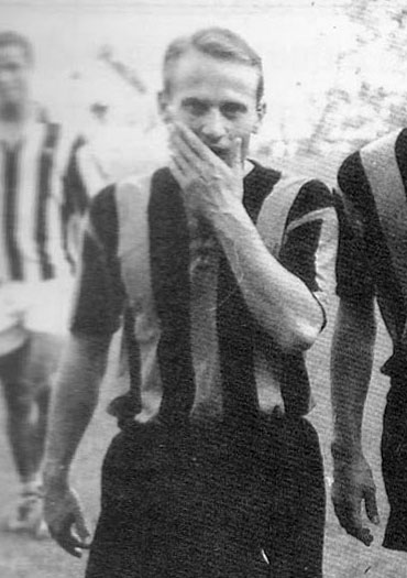 Milano, stadio San Siro, 13 settembre 1959. L'attaccante nerazzurro Mauro Bicicli esce dal campo all'intervallo della finale di Coppa Italia 1958-59 tra Inter e Juventus (1-4).